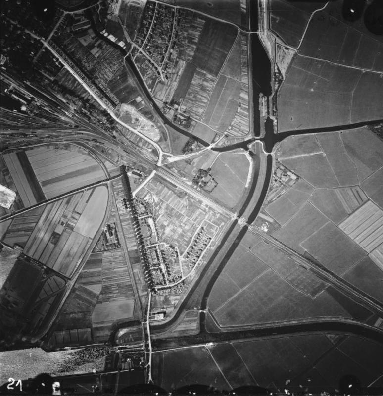 Luftaufnahme von Emden, Hafenanlagen in Emden